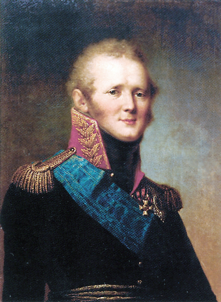 Тверь, Тверская областная картинная галерея